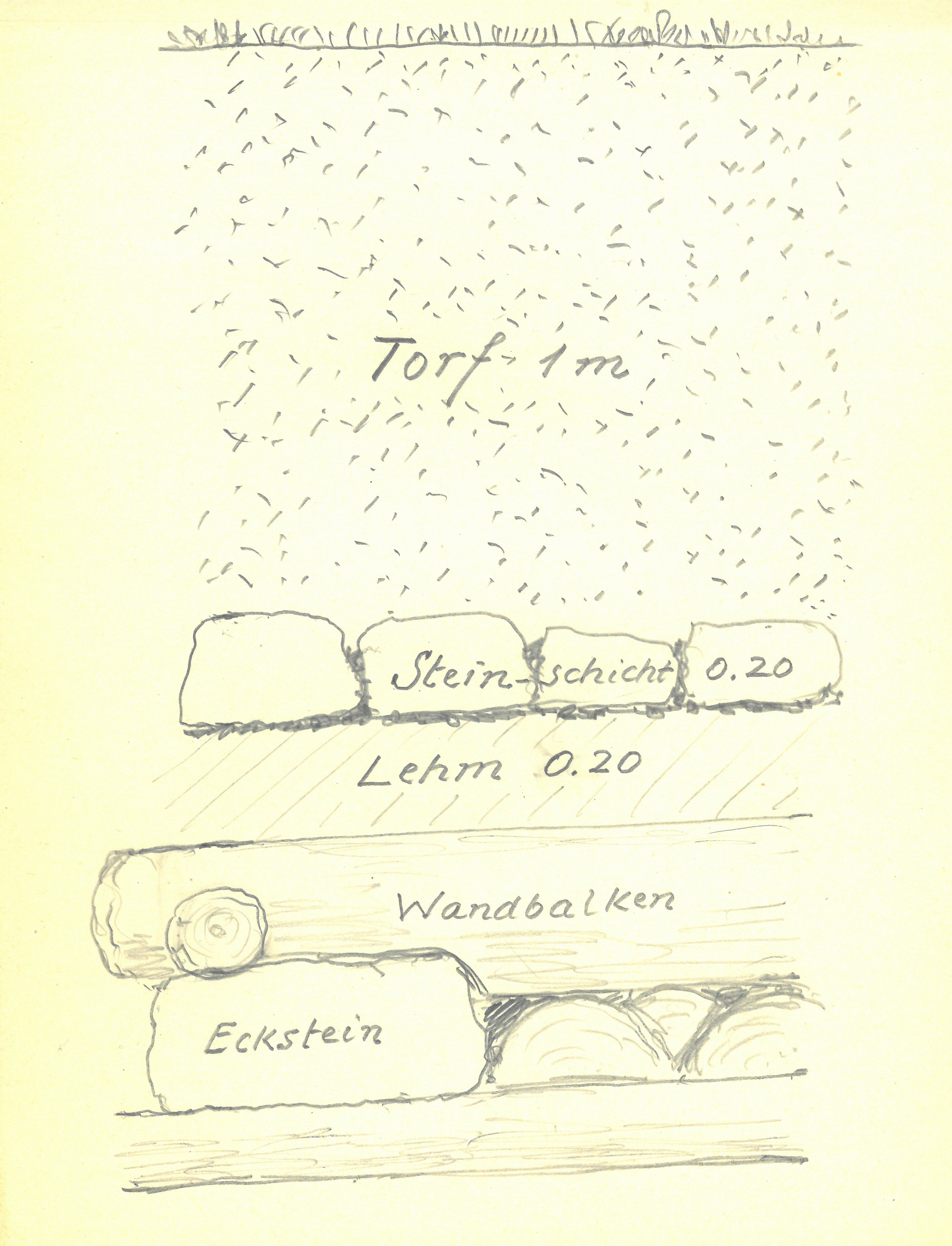 Nachlass Reinhold Bosch im Besitz der Kantonsarchäologie Aargau Mappe Seengen-Riesi In den Jahren 1923 und 1925 führte Reinhold Bosch Ausgrabungen in der Seeufersiedlung von Seengen-Riesi durch, die in die Spätbronzezeit (11. – 9. Jh. v. Chr.) datiert. Insbesondere wurde im September 1923 der Unterbau eines Pfahlbaus freigelegt. Die Zeichnung veranschaulicht die Stratigraphie (Schichtabfolge) der Fundstelle und wurde vermutlich im September 1923 erstellt.